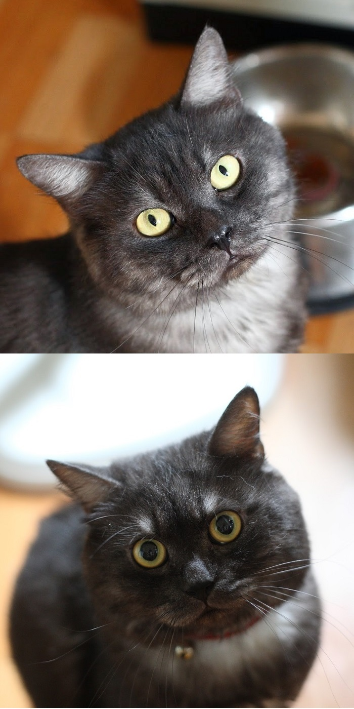 The change of pupils of a cat. 貓之瞳孔變化。來源：混種家貓楊小咪。